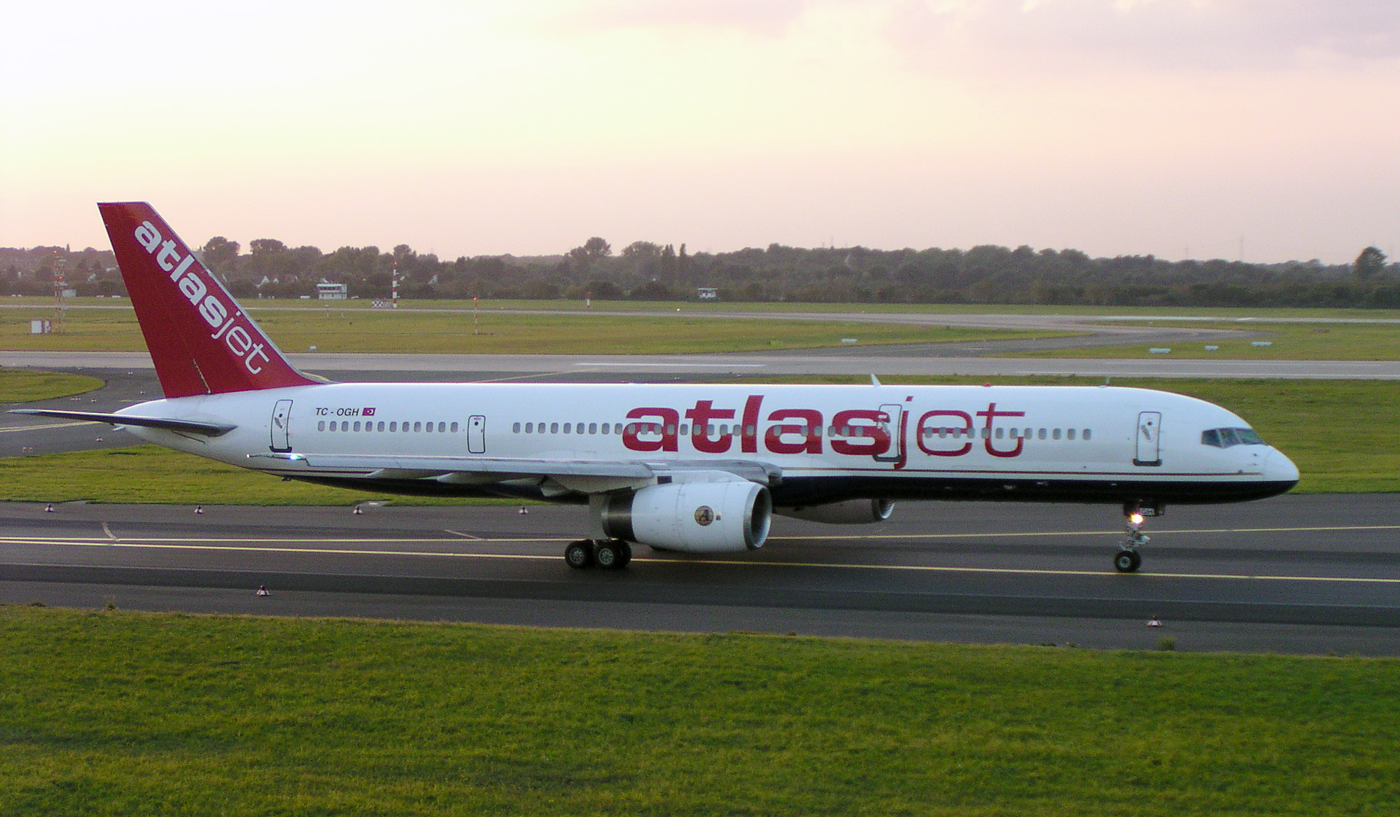 Boeing 757 de Atlasjet Description: Atlasjet B757-200 (TC-OGH) in Düsseldorf, September 2004. Photographer: Arcturus Licence: GFDL + cc-by-sa-2.0-de